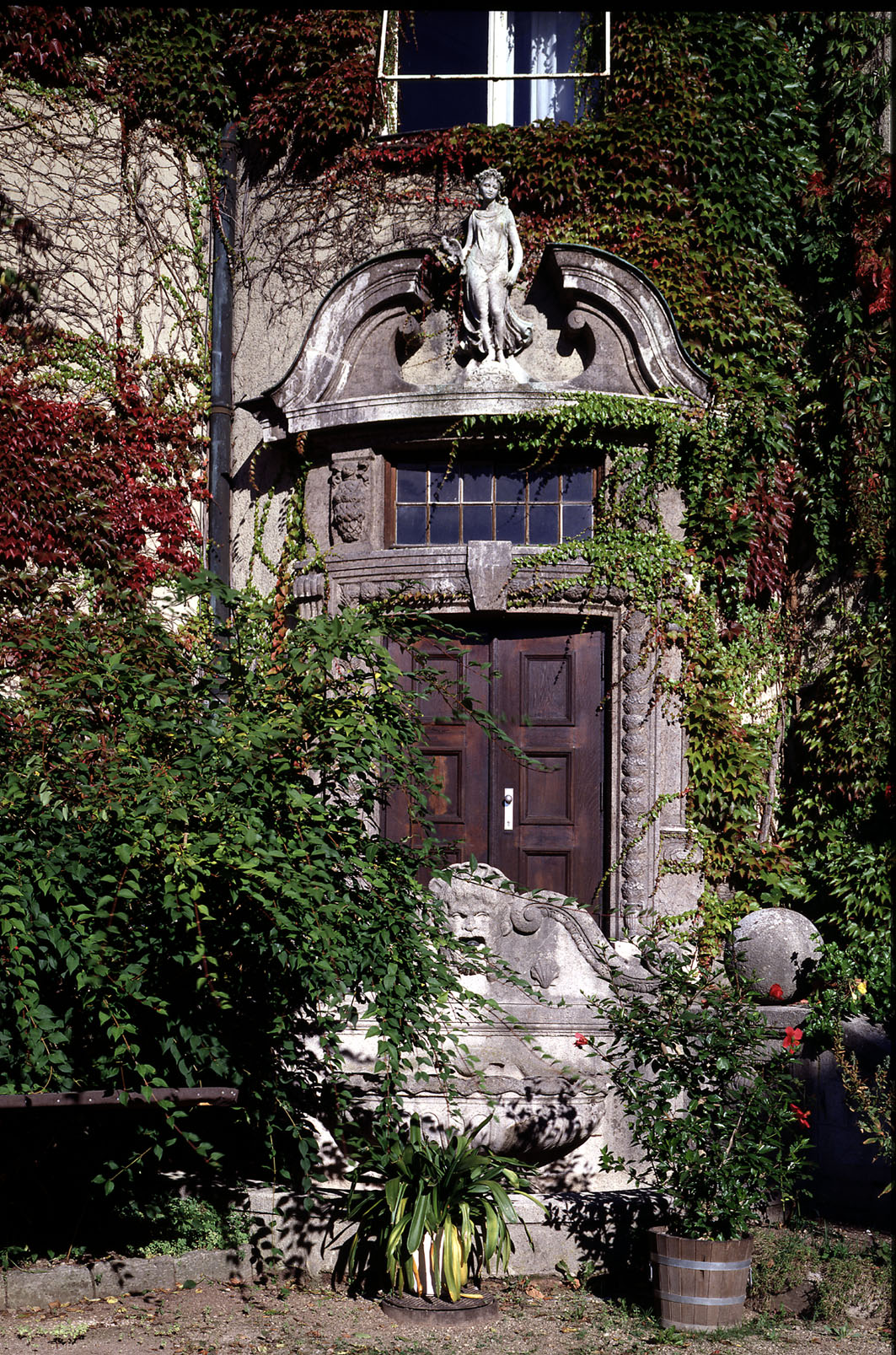 Botanisches Institut, Südseite, Tür beim Irisgarten, Figur der Flora von W. S. Resch, 1913, Photo ca. 2009